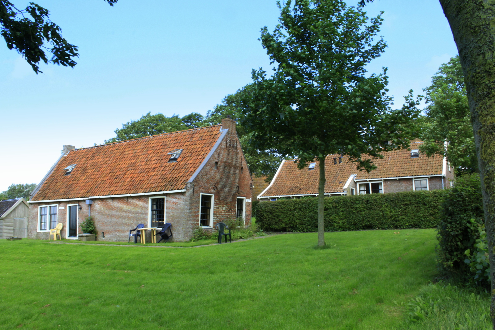 De monumentale diakoniewoningen uit 17e eeuw in het terpdorp Jannum, ze maken deel uit van het beschermde dorpsgezicht.